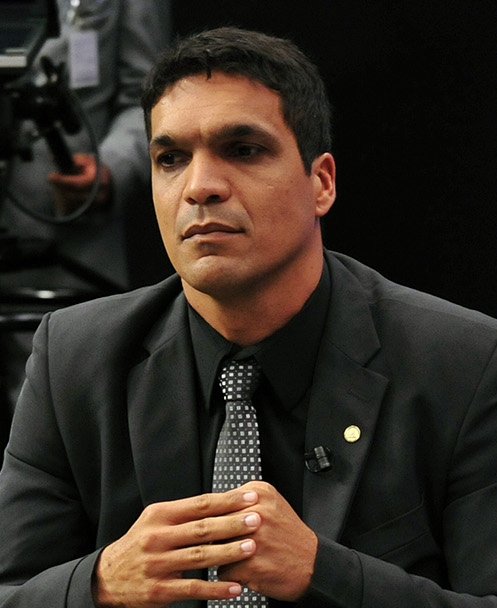 Deputados cabo Daciolo (PSOL-RJ) e Marcos Reategui (PSC-AP) participam do programa Brasil em Debate.